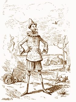 Le avventure di Pinocchio visto da Enrico Mazzanti, Firenze, 1883